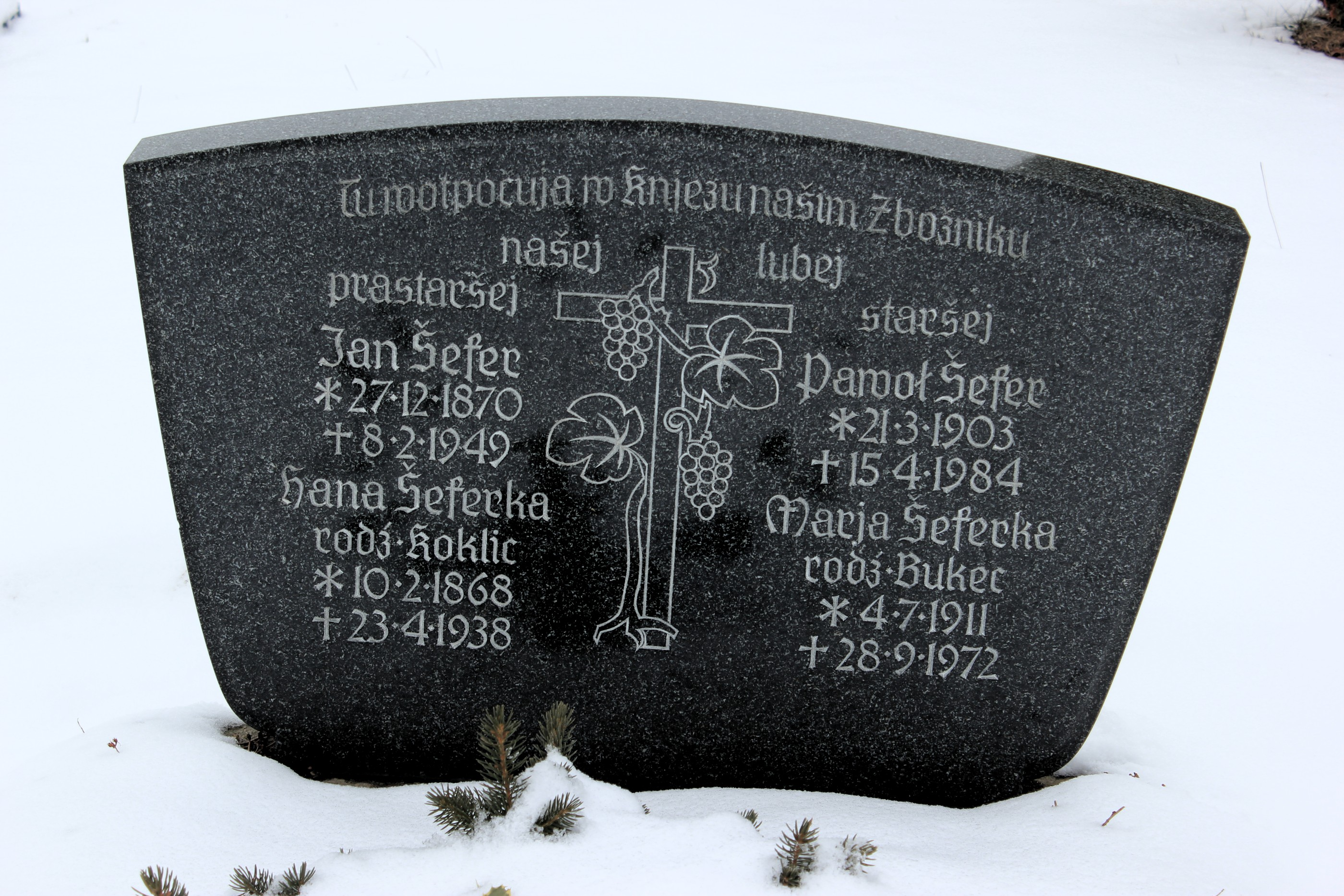 Hornjoserbsce: Serbski narowny kamjeń na Zdźěrjanskim kěrchowje.